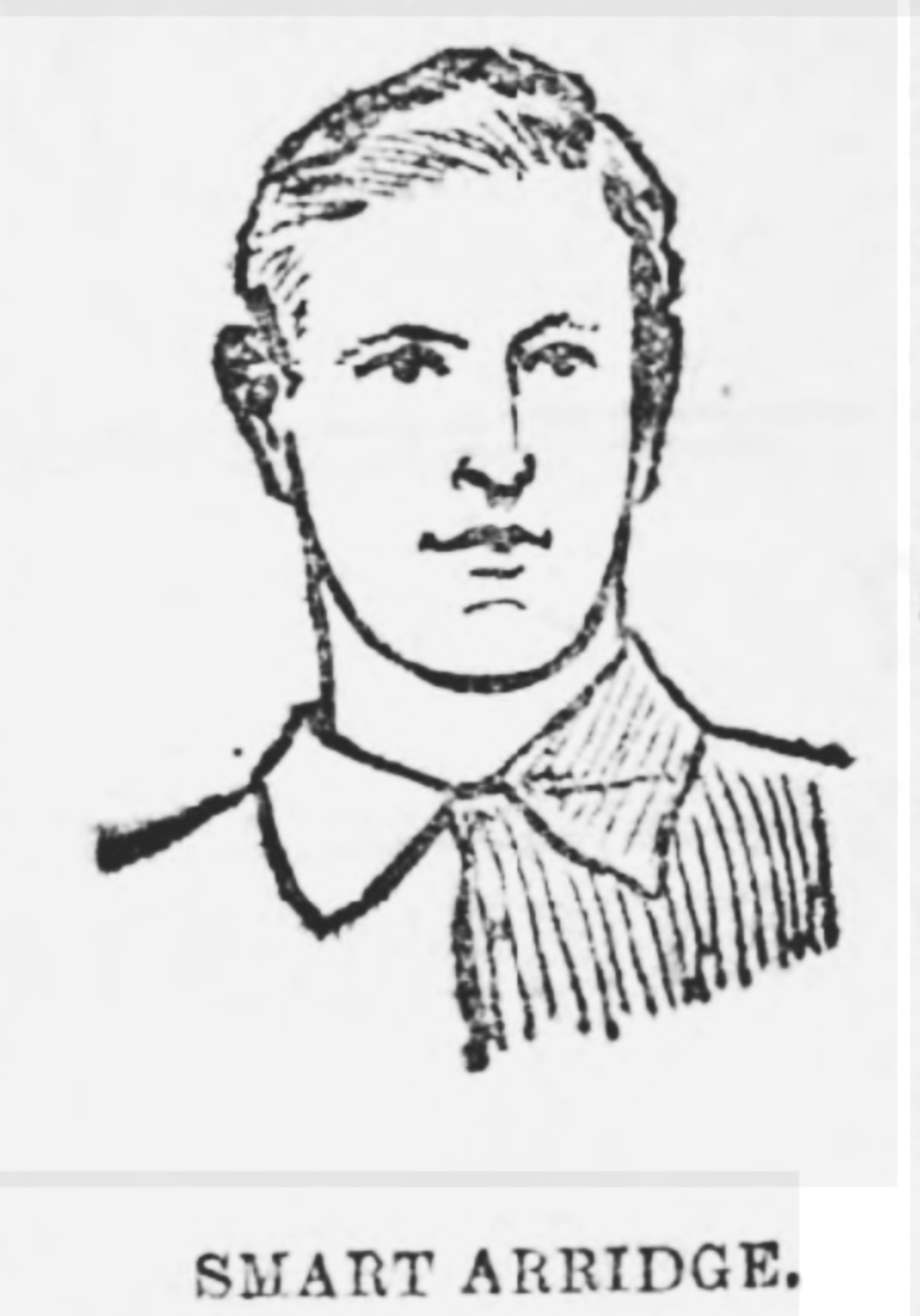 Smart Arridge, (1872 -1947) peldroediwr rhyngwladol Cymreig